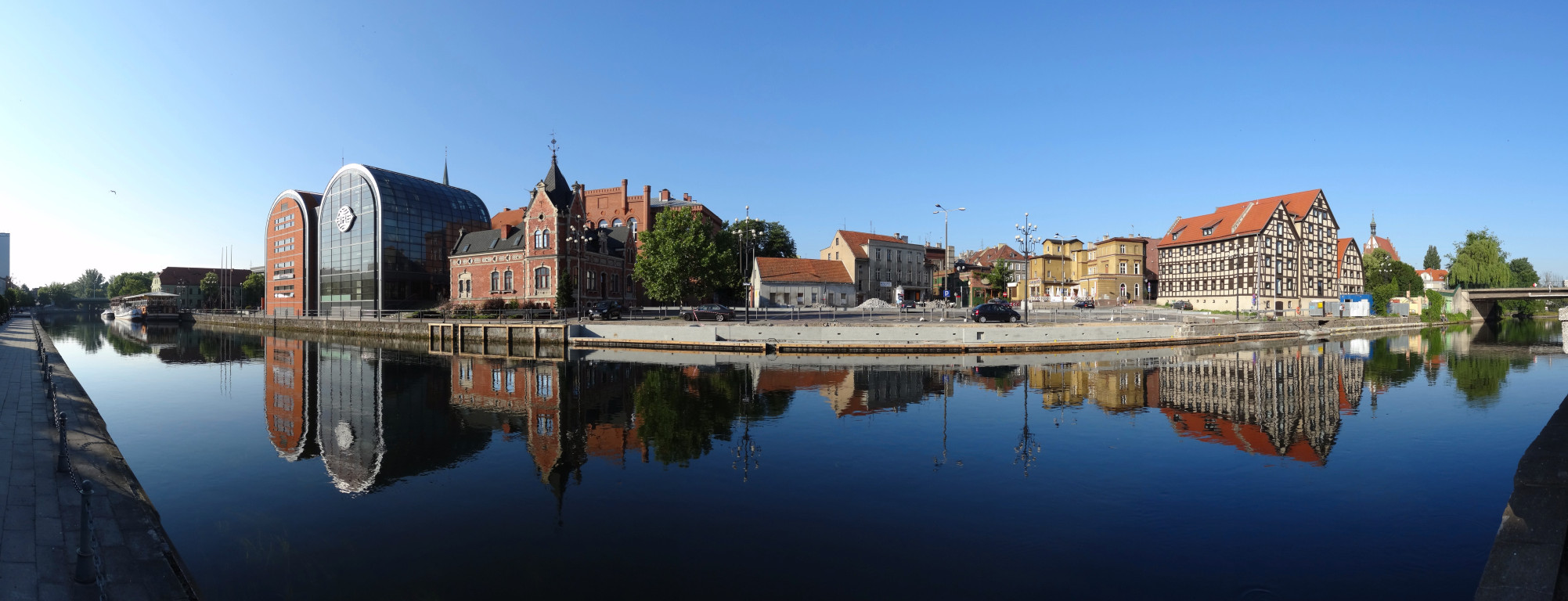 Południowe nabrzeże Brdy w centrum Bydgoszczy